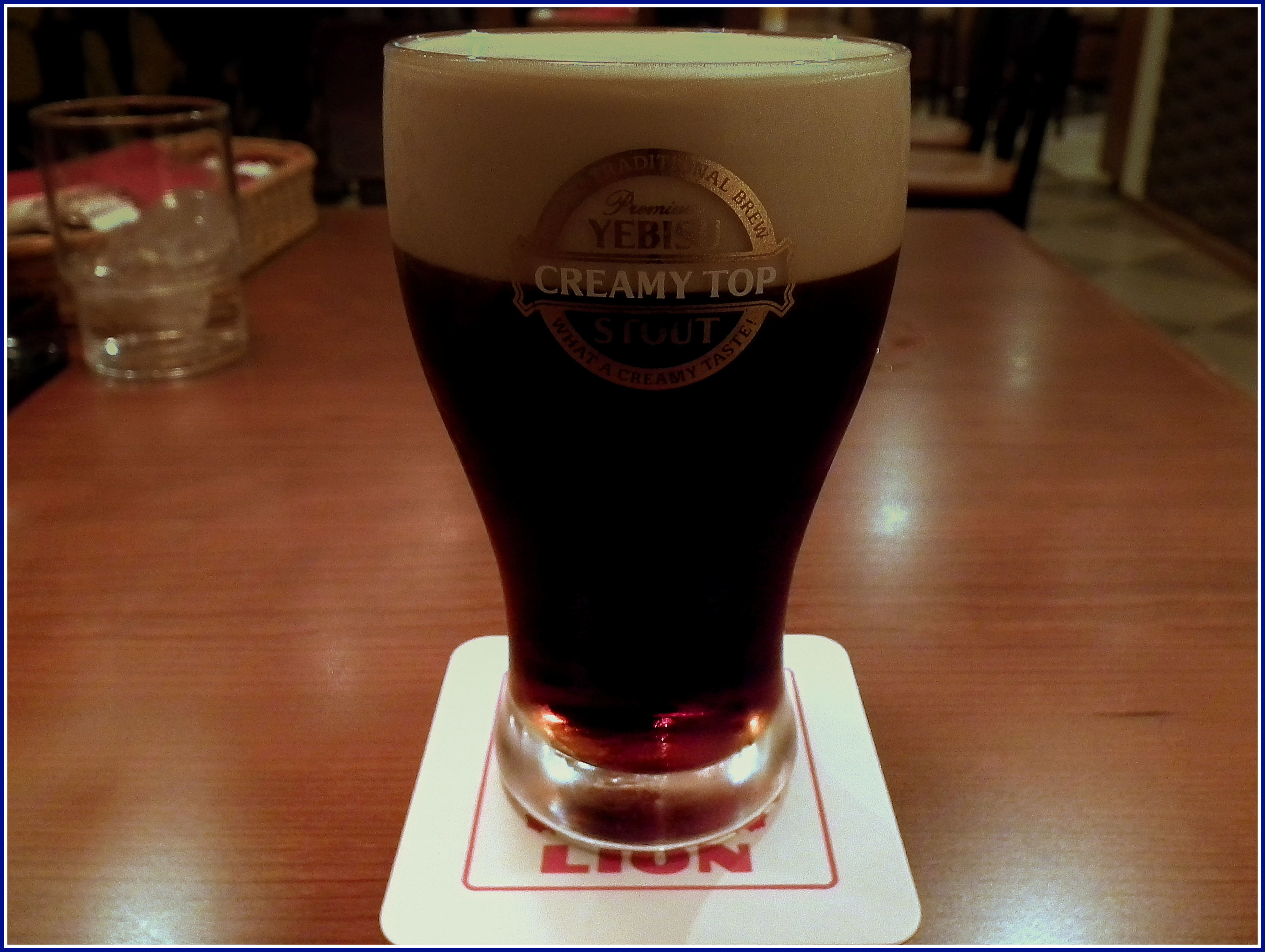 YEBISU CREAMY STOUT SAPPARO JAPAN JUNE 2012